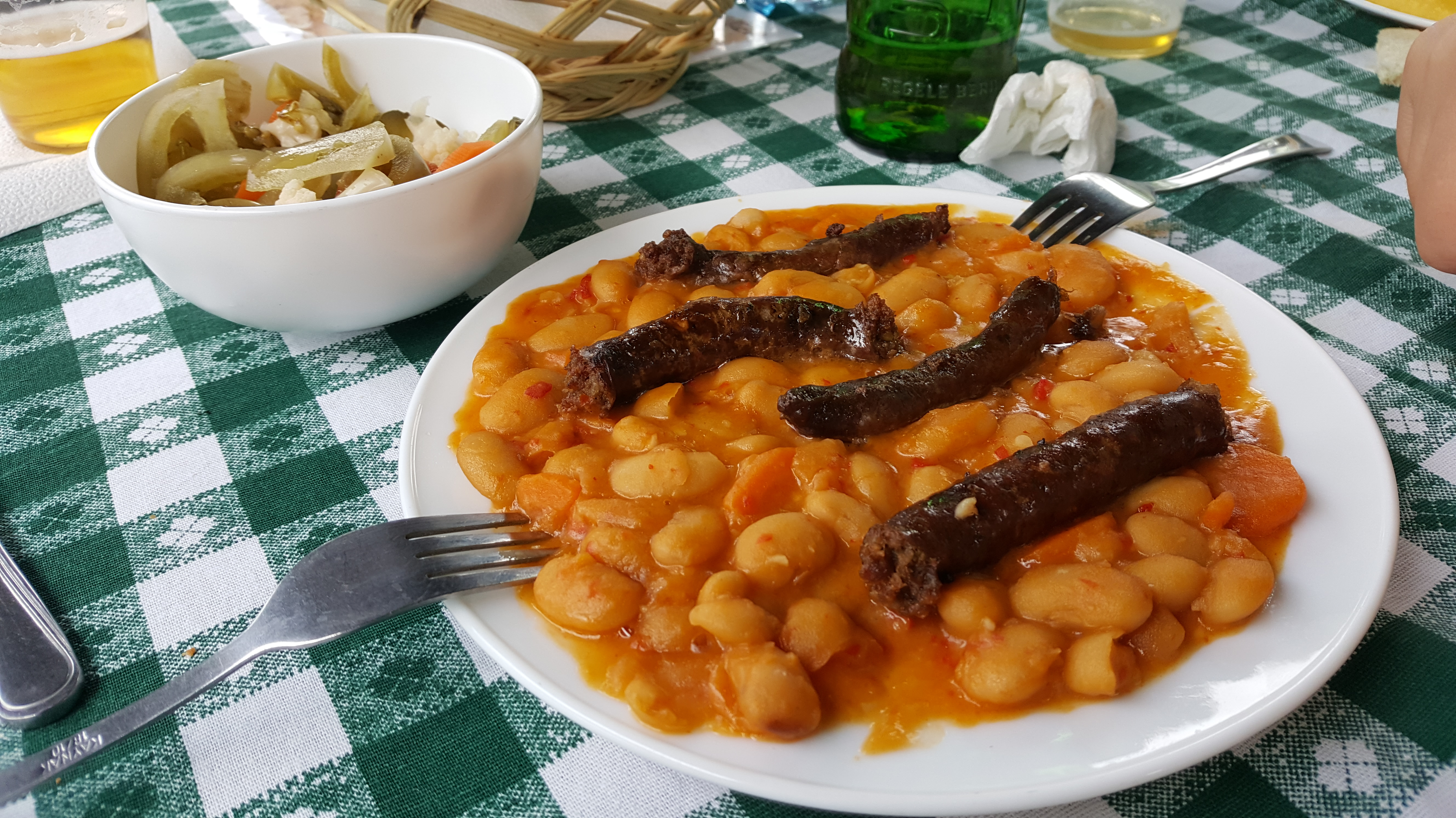 Iahnie de fasole cu cârnați